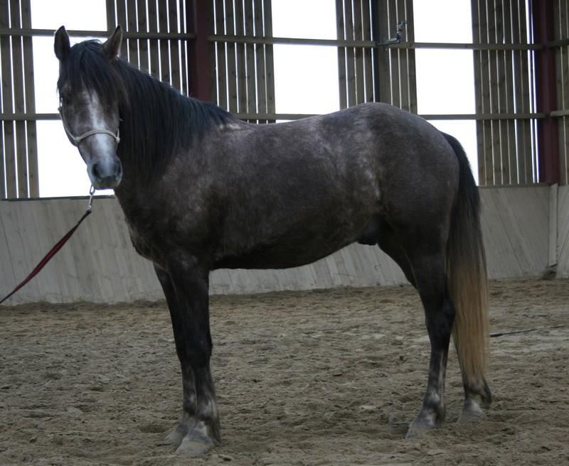 Haflo Arabe au modèle